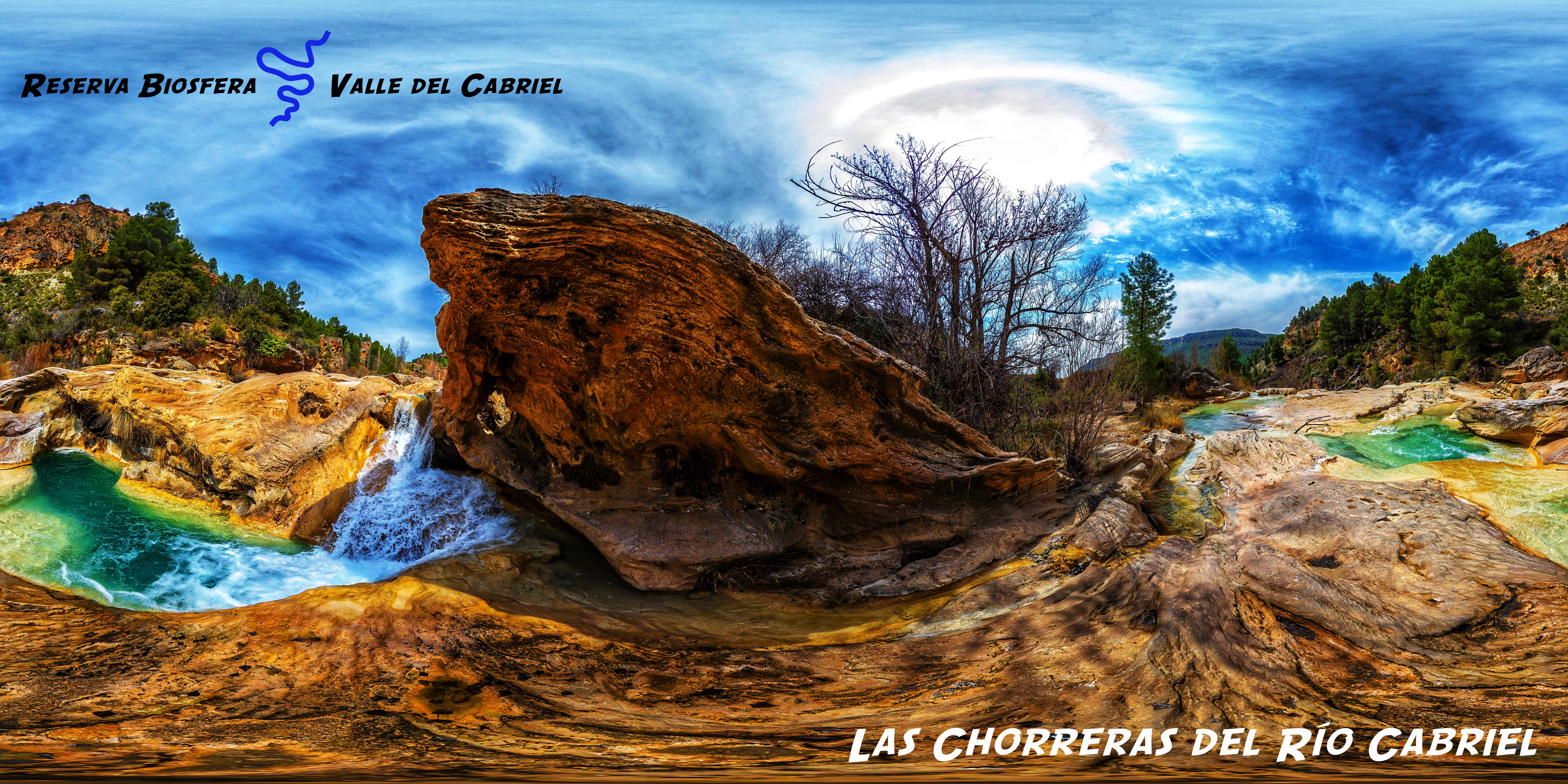 Las chorreras del río Cabriel a su paso por Enguídanos y Villora